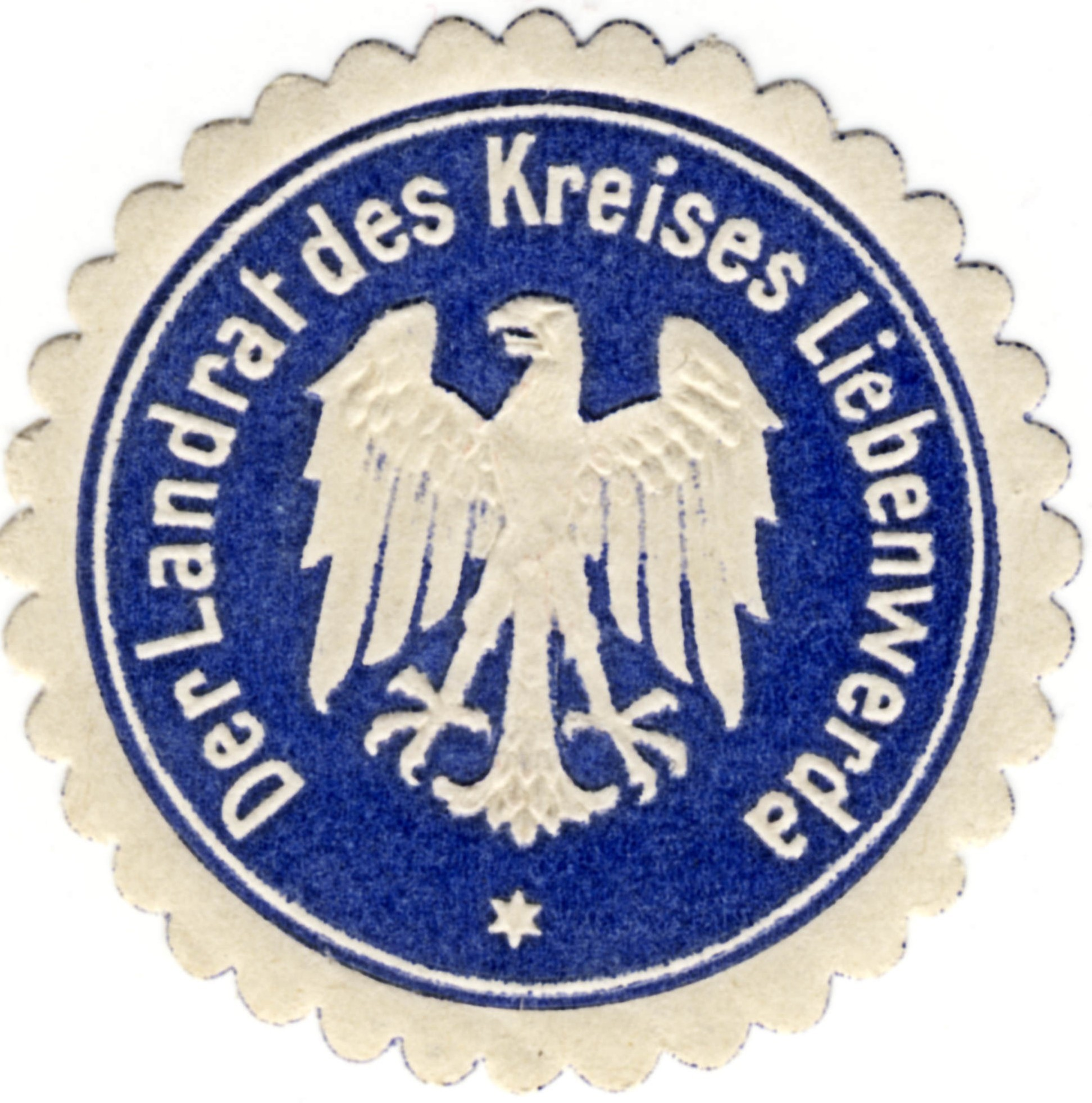 Siegelmarke des Landkreises Liebenwerda (1815-1952)